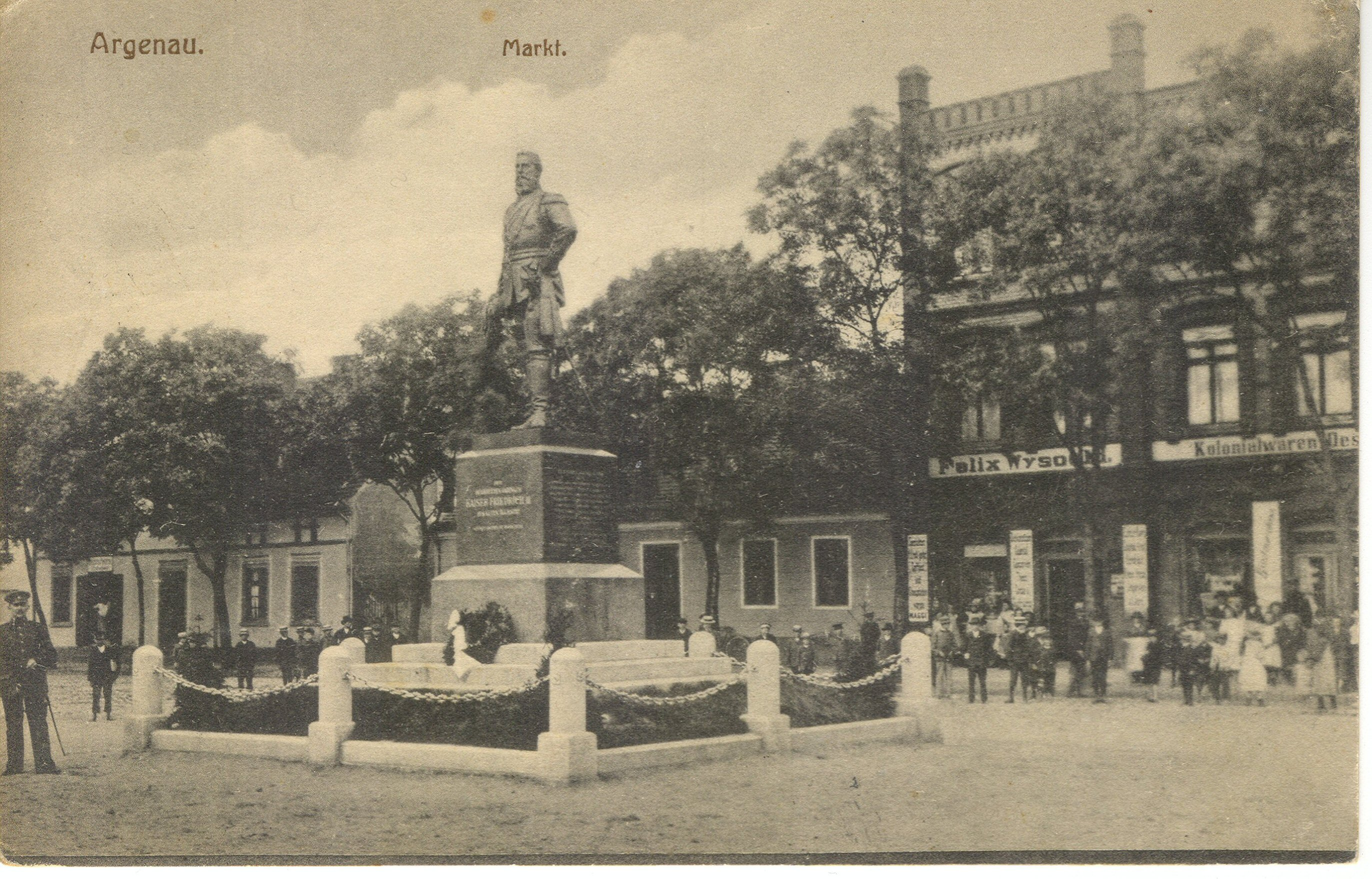 Das Kaiser Friedrich III-Denkmal in Gniewkowo (Argenau), Polen unter preussischen Besatzung